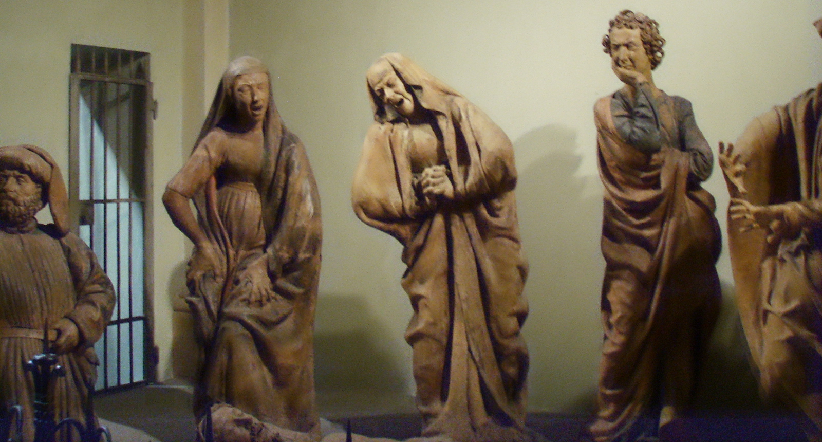 Niccolò dell'arca, Compianto sul Cristo morto, Chiesa di S. Maria della vita, Bologna